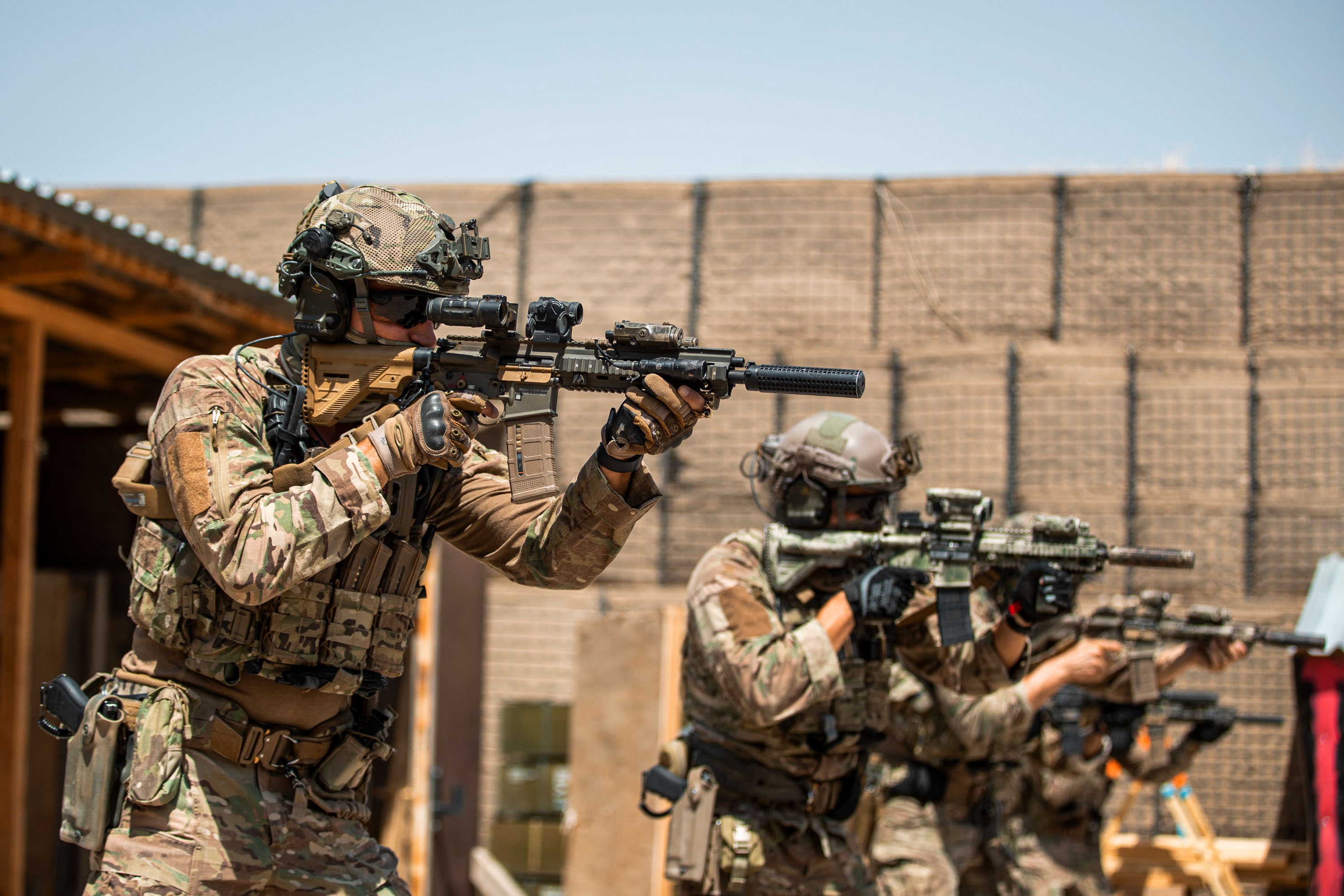 Ontspannen koppen en veel grappen, maar in een oefening of operatie gaat de knop direct om. Het laat de professionaliteit zien van de veelzijdige Maritime Special Operations Forces (MARSOF)-operators. De mannen van de Afghan Territorial Force 888 mogen blij zijn met deze toptrainers. Andersom leren de Nederlandse special forces ook van de Afghanen. De maritieme special forces maken deel uit van het Special Operations Advisory Team (SOAT) dat de Afghanen binnen NAVO-missie Resolute Support de kneepjes van het SF-vak bijbrengt. ATF 888, actief in het noorden van Afghanistan, is een van de triple units, de speciale politie-eenheden van de Afghaanse overheid. Het Korps Commandotroepen (KCT) zette vorig jaar het trainingsprogramma op vanuit Camp Marmal bij Mazar-e-Sharif. De vierde rotatie is voor MARSOF. Het doel? Over 2 jaar moeten de Afghanen zelfstandig, met een helikopter of auto ergens heen verplaatsen. Maar ook hun eigen veiligheid waarborgen, een instap maken en iemand oppakken, die betrokken is bij terreur, drugshandel of zware criminaliteit.